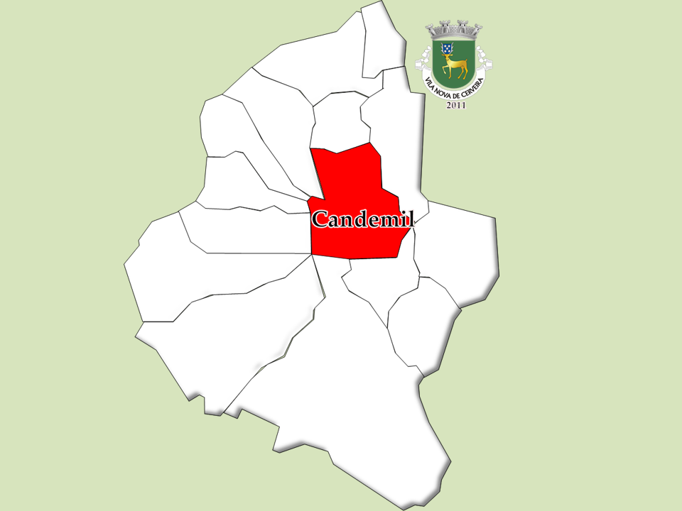 Censos 1864/2011